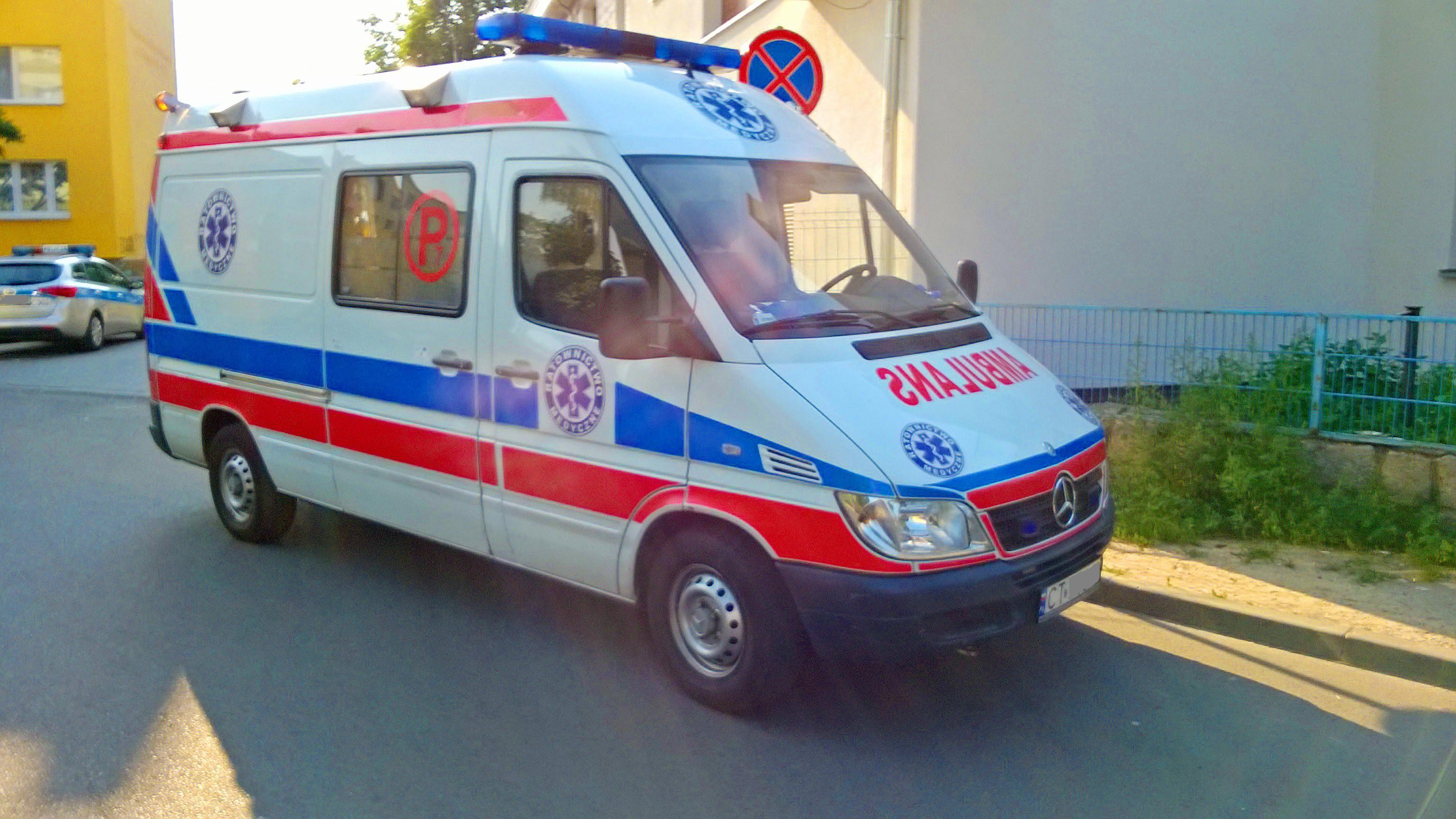 Toruńska karetka zespołu wyjazdowego podstawowego